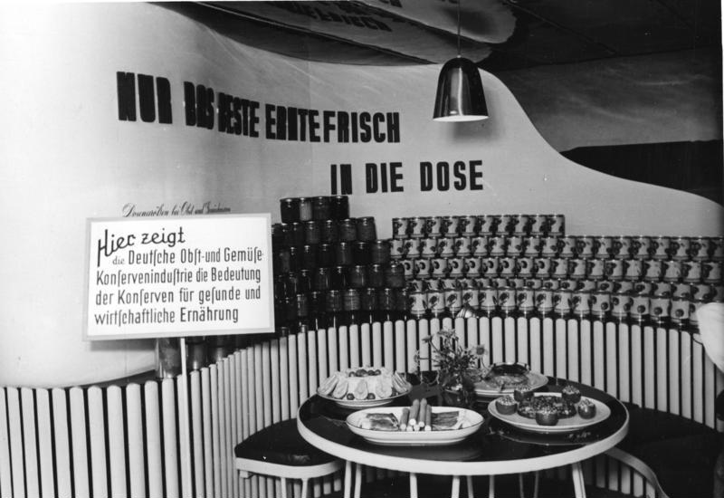 Erste Bundesgartenschau in Hannover Die deutsche Konservenindustrie zeigt ihre Leistung.